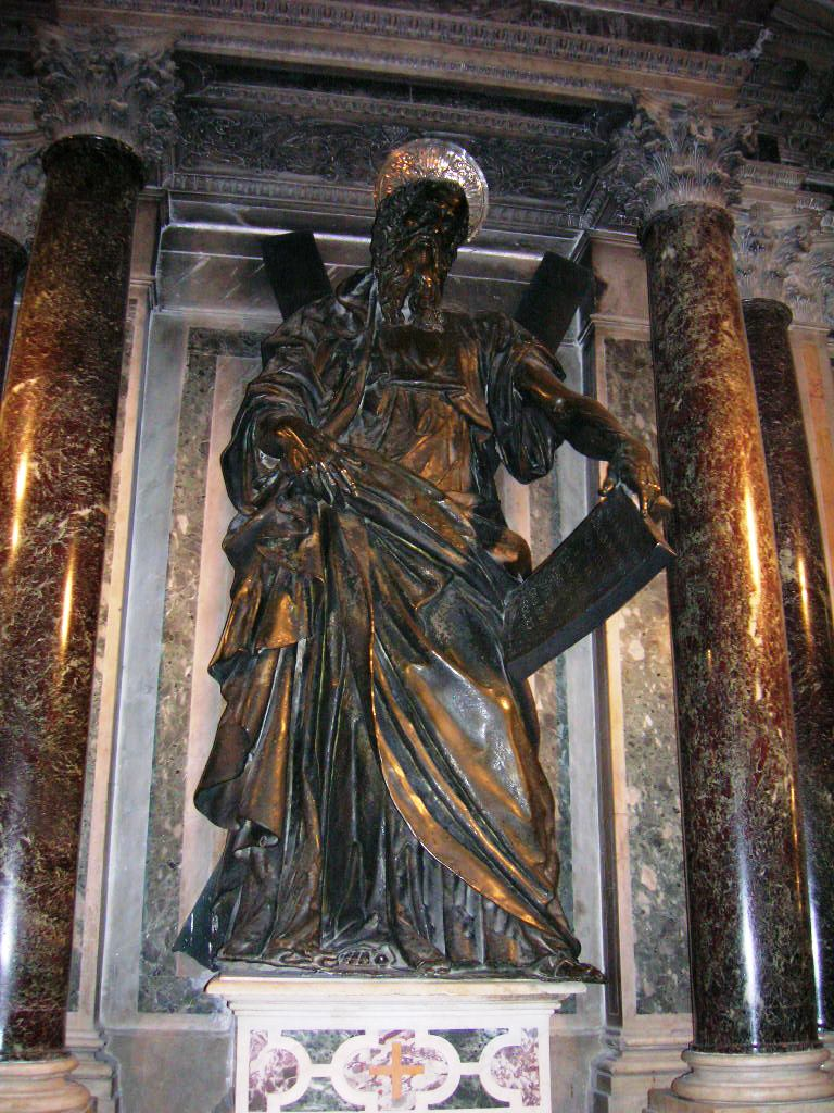 Statua della cripta